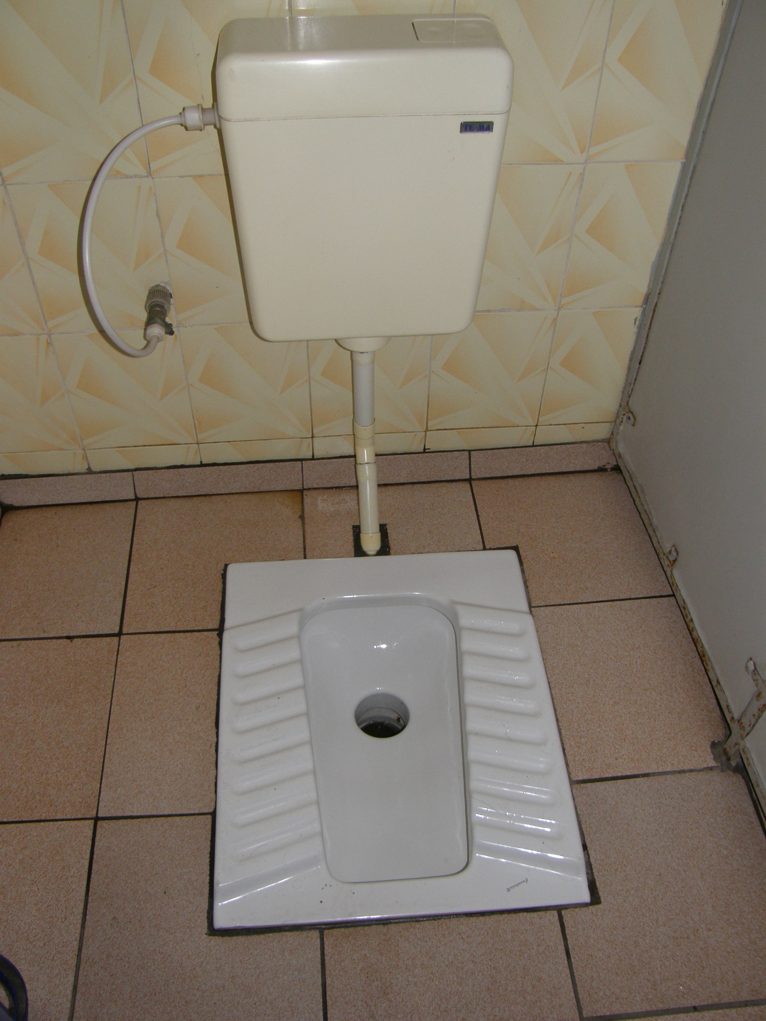 Парк Донецкого металлургического завода